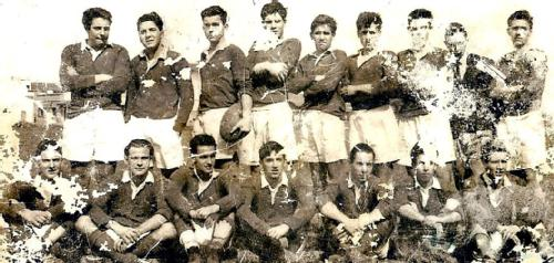 Raúl Othacehé (sentado, segundo desde la izquierda), intendente de Merlo cuando jugaba para el Colegio San José de los Hermanos Maristas.